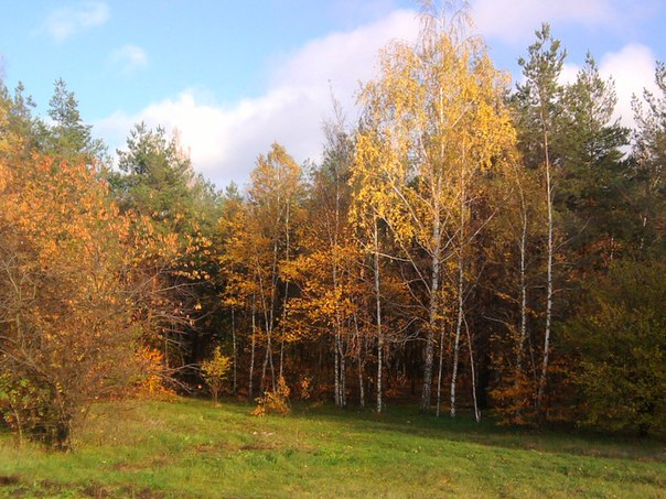 Березово-сосновый лес в окрестностях села Коротяк. Компаніївський район